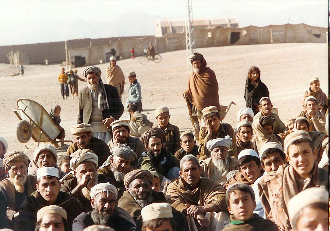 Opnam am Flüchtlingslager (1987).